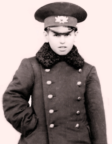 Пустовалов Л.В.